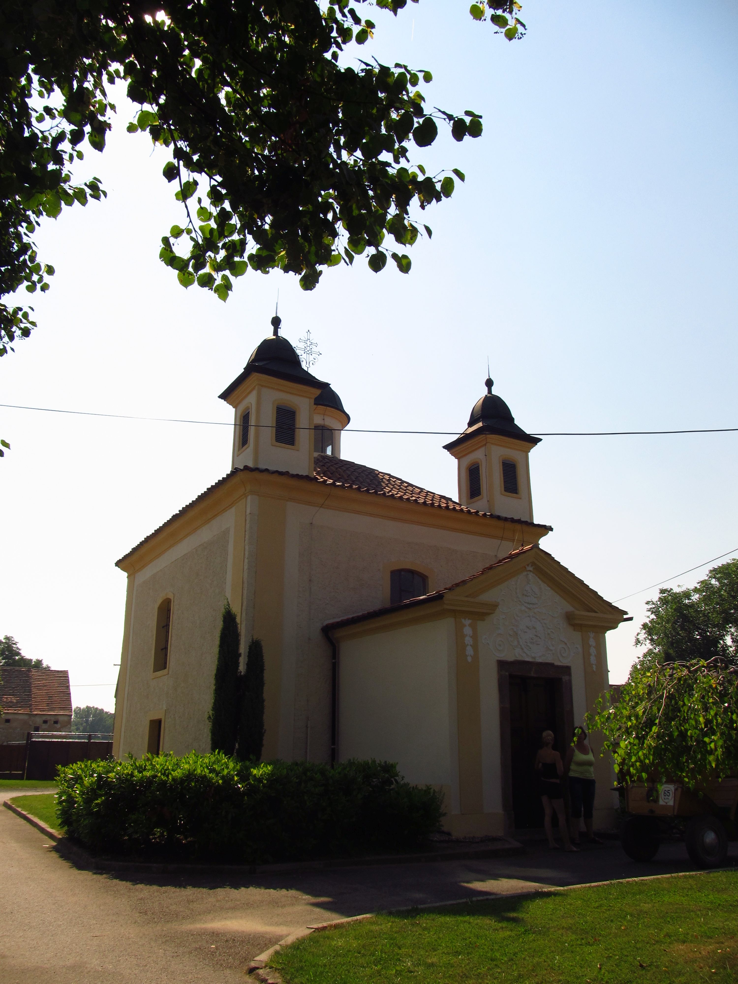 Kaplička svatého Jana Nepomuckého, Chvalín.